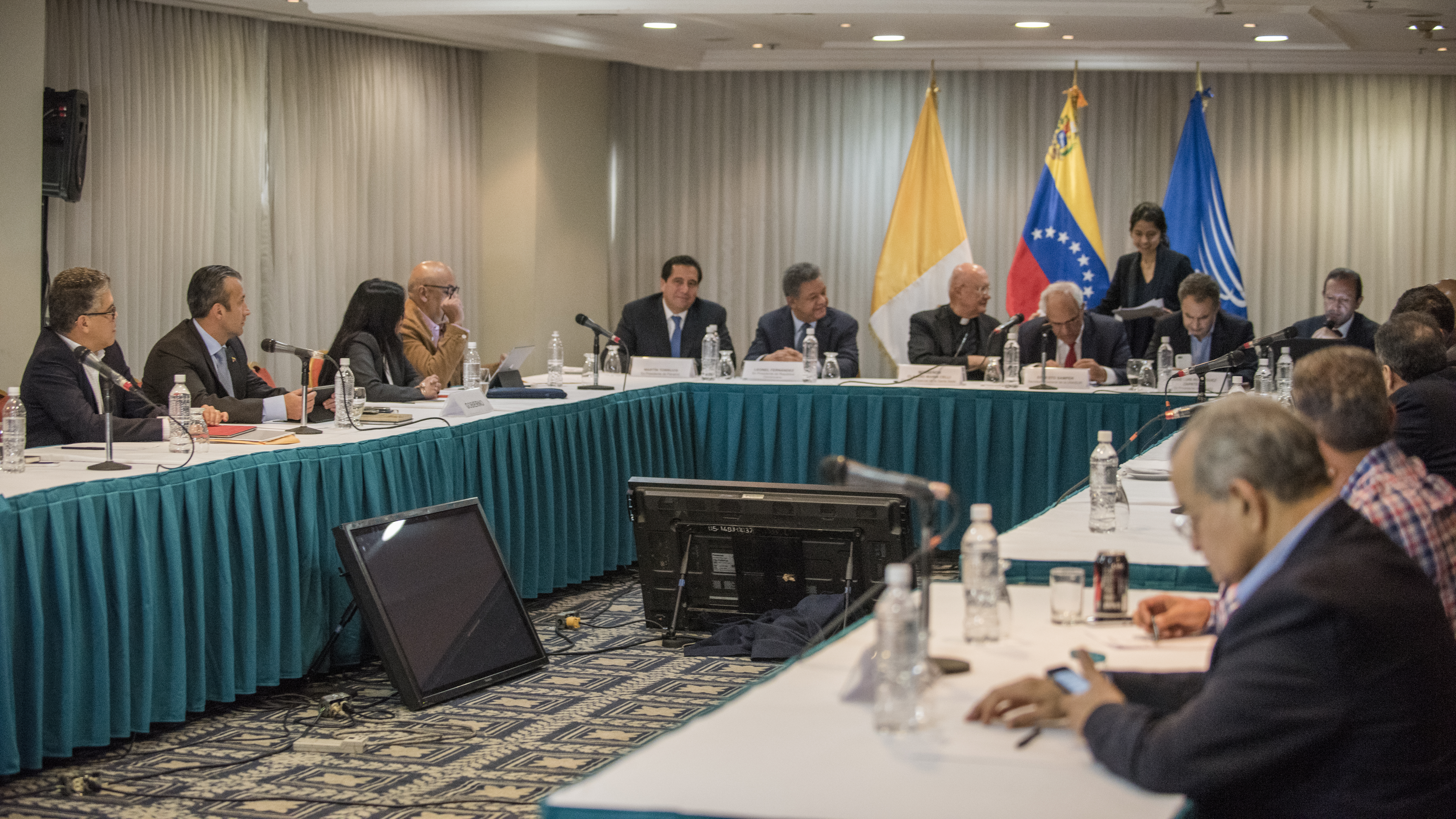 Mesa de diálogo instalada el 12 de Diciembre, 2016. Mediada por el vaticano y la UNASUR, busca acercar a representantes del gobierno de Venezuela con miembros de la MUD (oposición) para destrabar el conflicto político/económico del país.